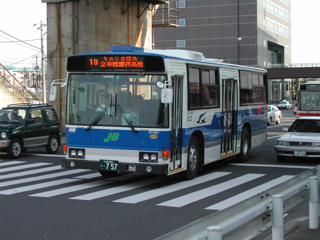 19番時代 2002-5-2 新札幌ターミナル付近にて撮影